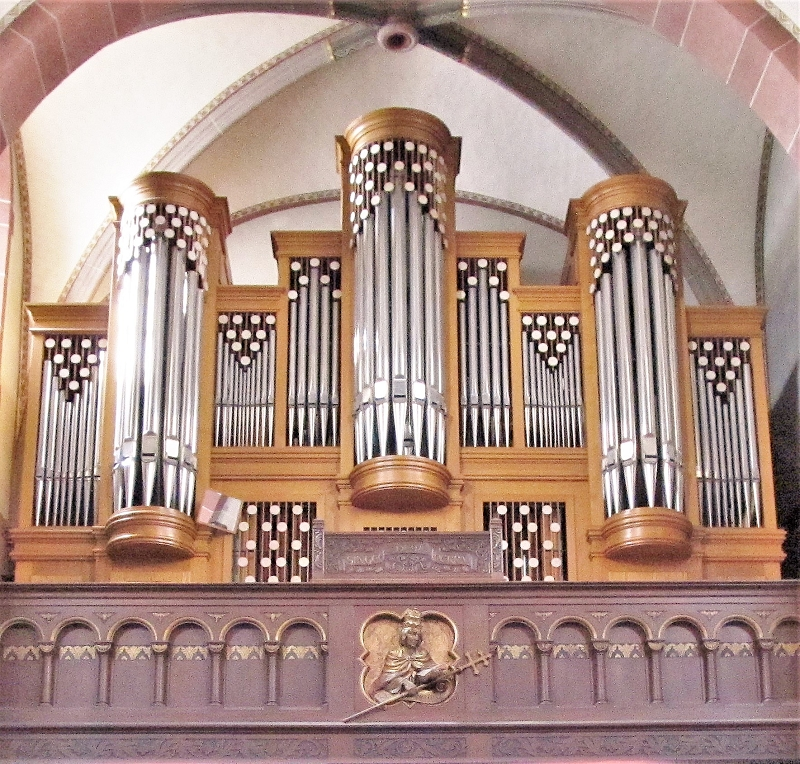 Orgelempore der katholischen Pfarrkirche St. Remigius in Bliesen, einem Stadtteil von St. Wendel, Saarland